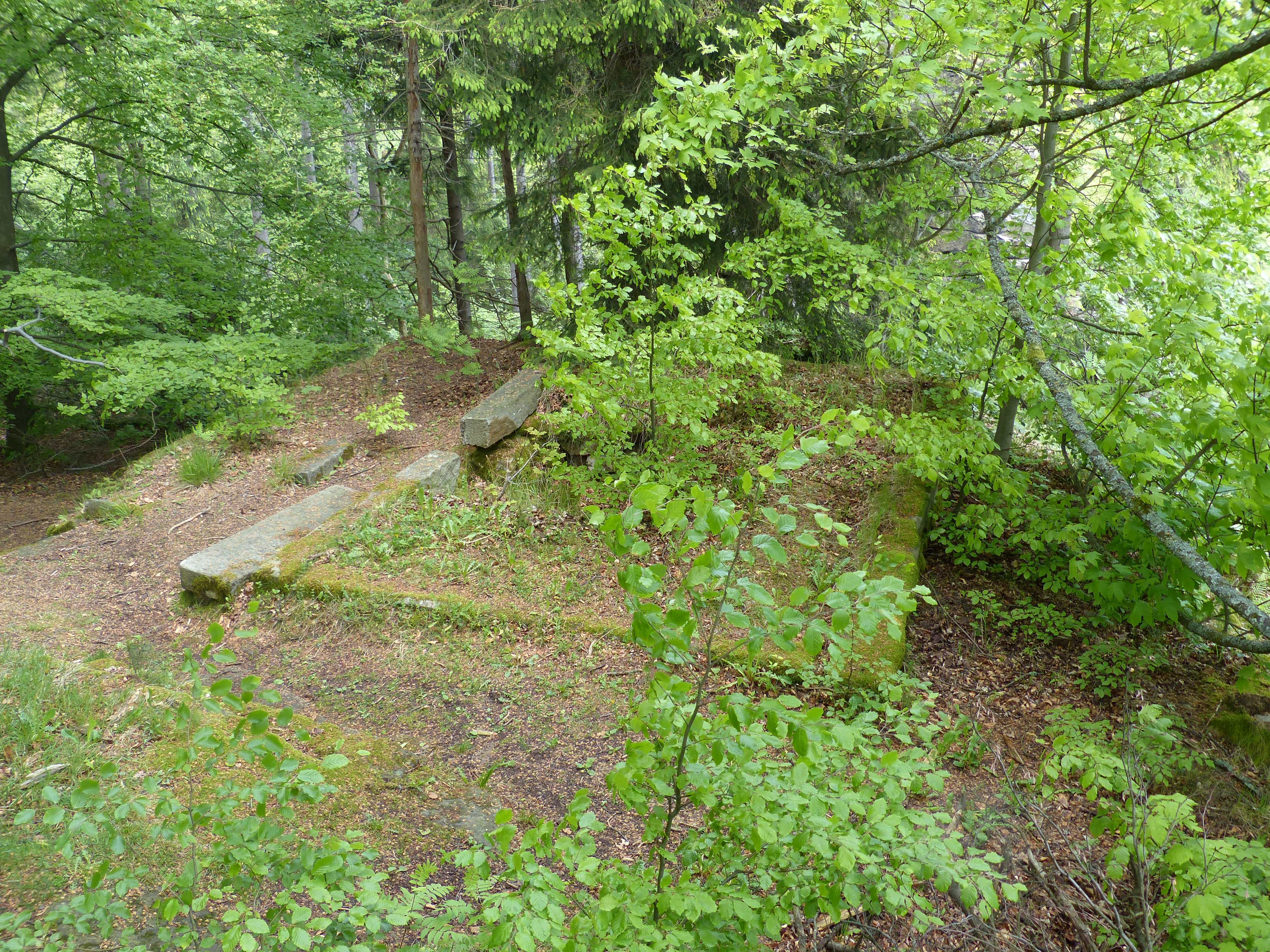 Ruine Hirschstein, Großer Kornberg im Fichtelgebirge